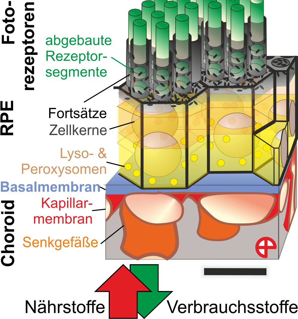 Der dreidimensionale Zusammenhang der Mikrostruktur des Choriocapillaris - Bruchmembran - Retinalpigmentepitheliumskomplexes wird beschrieben.